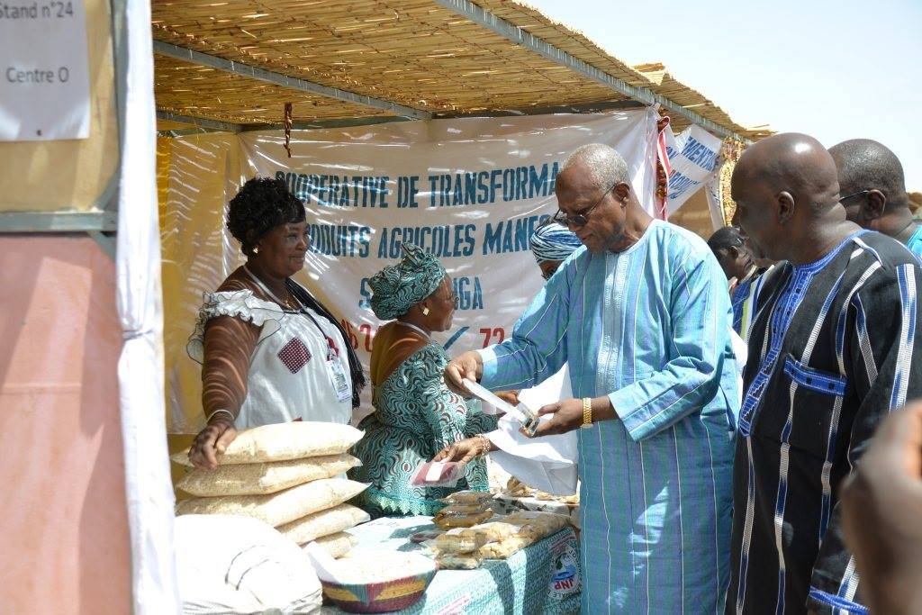 Commémoration de la journée des légumineuses : Le Premier ministre du Burkina Faso devant le stand d'une productrice dans la commune de Meguet, le 11 février 2019. (VOA/Issa Napon) Venu soutenir la filière, le Premier ministre Christophe Dabiré s’est voulu rassurant sur la volonté du gouvernement burkinabè d’apporter son concours pour accélérer la professionnalisation du secteur.